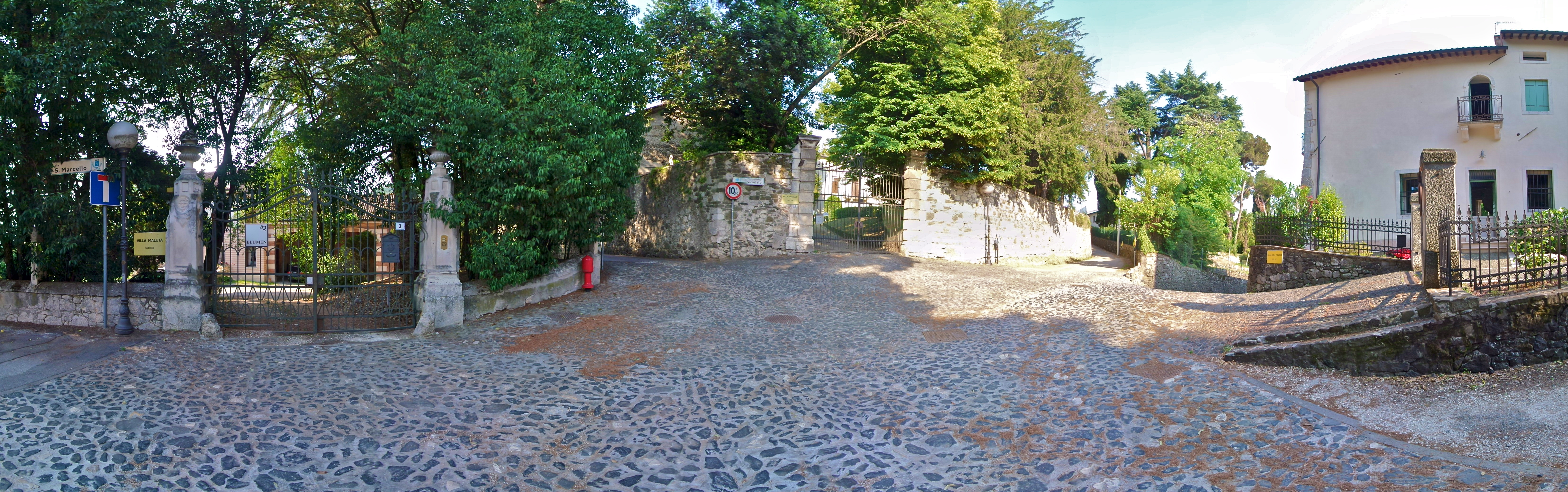 Panorama a 360 gradi in Piazzetta del Vicariato, Brendola (VI)